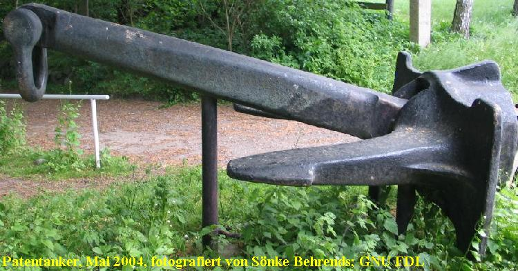 Patentanker Titel: Patentanker Beschreibung: Das Foto entstand während meiner Radtour von Hamburg nach Eckernförde. Auf dem am Nord-Ostsee-Kanal gelegenen Gut Steinwehr ist dieser Anker ausgestellt. Auf einem kleinen Messingschild am Anker stehen folgende Informationen zum angebildeten Anker: BUGANKER MS "Mangan" (gebaut 1969 bei der Lübecker Flender Werft AG [1]) Bei einem Ankermanöver in schwerem Wetter im Golf von St. Lorenz wurde der Anker stark beschädigt und deshalb, nach 20 Jahren Einsatzzeit auf allen Weltmeeren, ausgewechselt. Gewicht: 4.890 kg